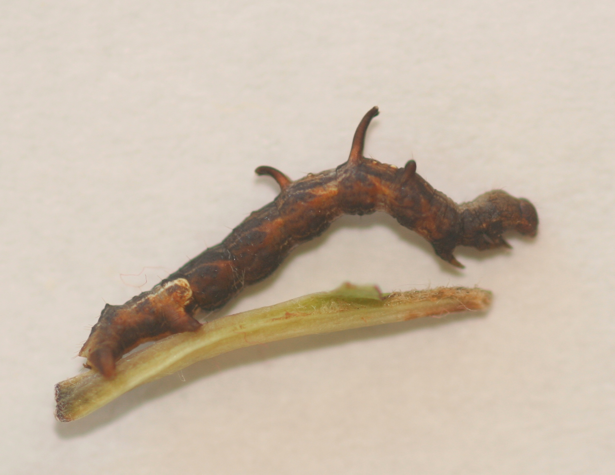 Larva of Nematocampa resistaria, Geometridae, Delton, MI, USA